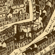 Madrid. Detalle del plano de Pedro Teixeira, de 1656, donde se aprecian restos de la muralla cristiana de la ciudad